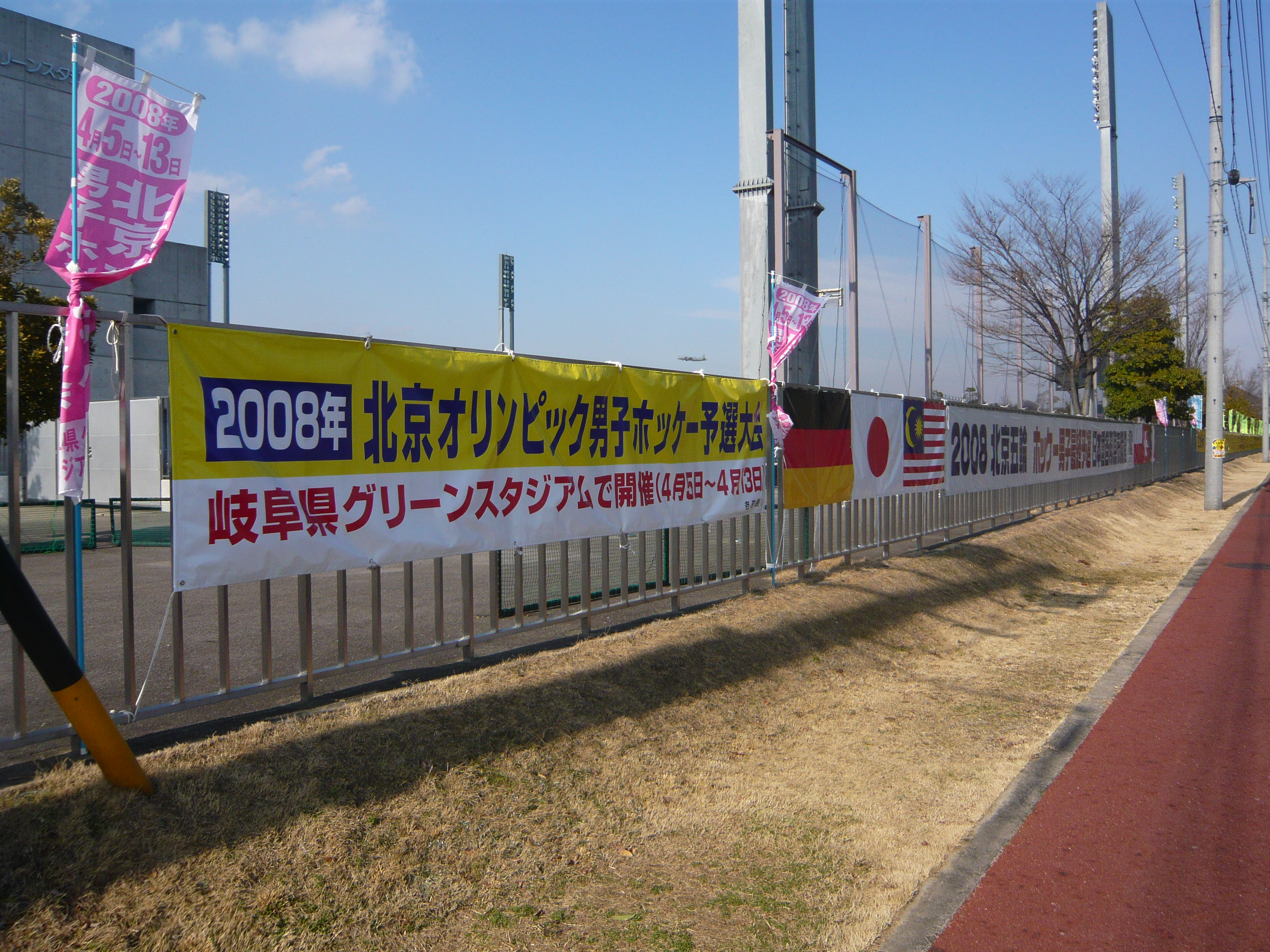 Gifu Prefectual Green Stadium（岐阜県グリーンスタジアム）,Kakamigahara,Gifu,Japan（岐阜県各務原市）で撮影。